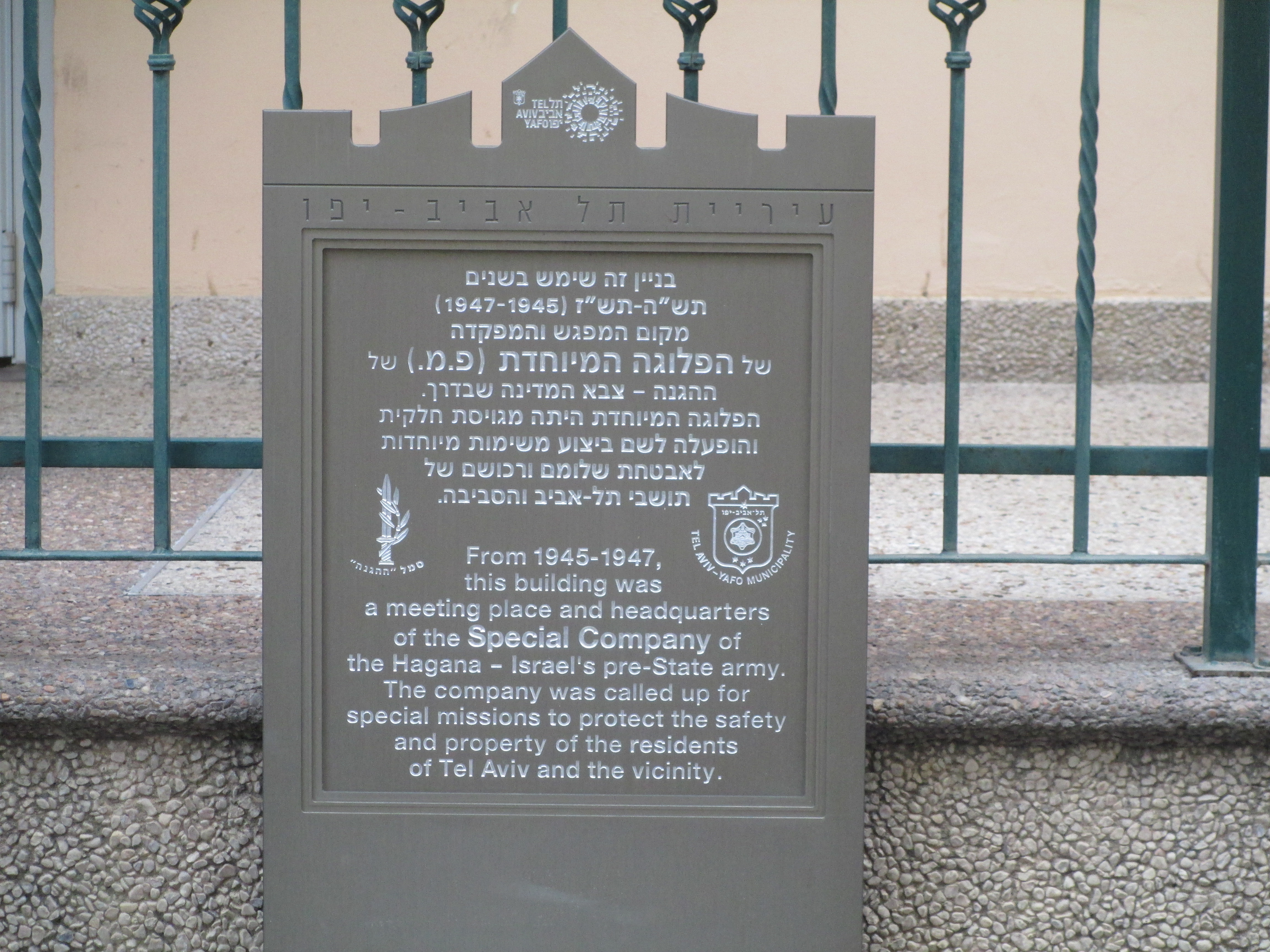 לוחית זיכרון לפלוגה המיוחדת של ההגנה בתל אביב ברח' סמטת בית השואבה 8